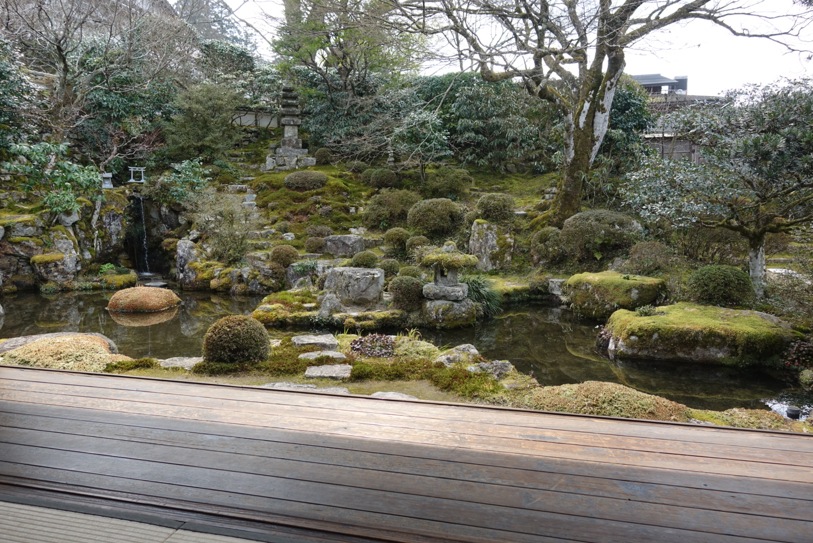 京都大原にある実光院の庭園